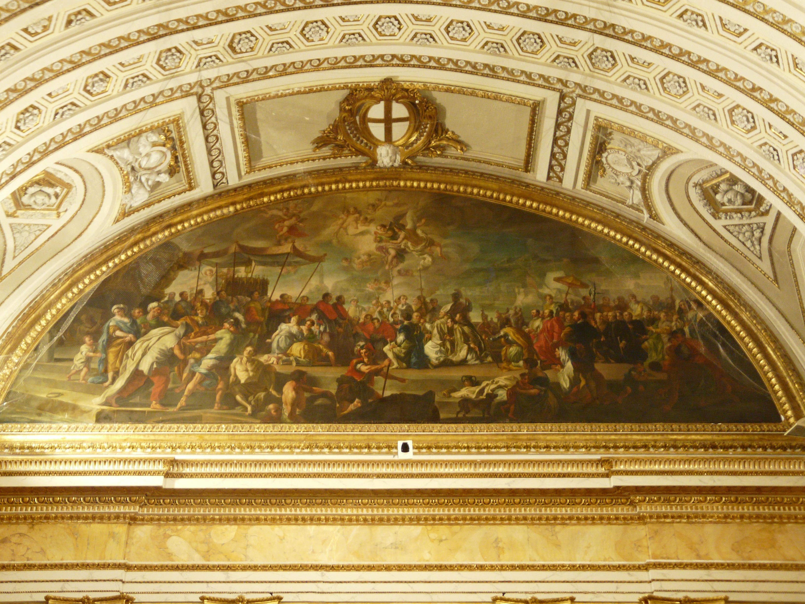 Sala del Minor Consiglio, Palazzo Ducale, Genova, Liguria, Italia